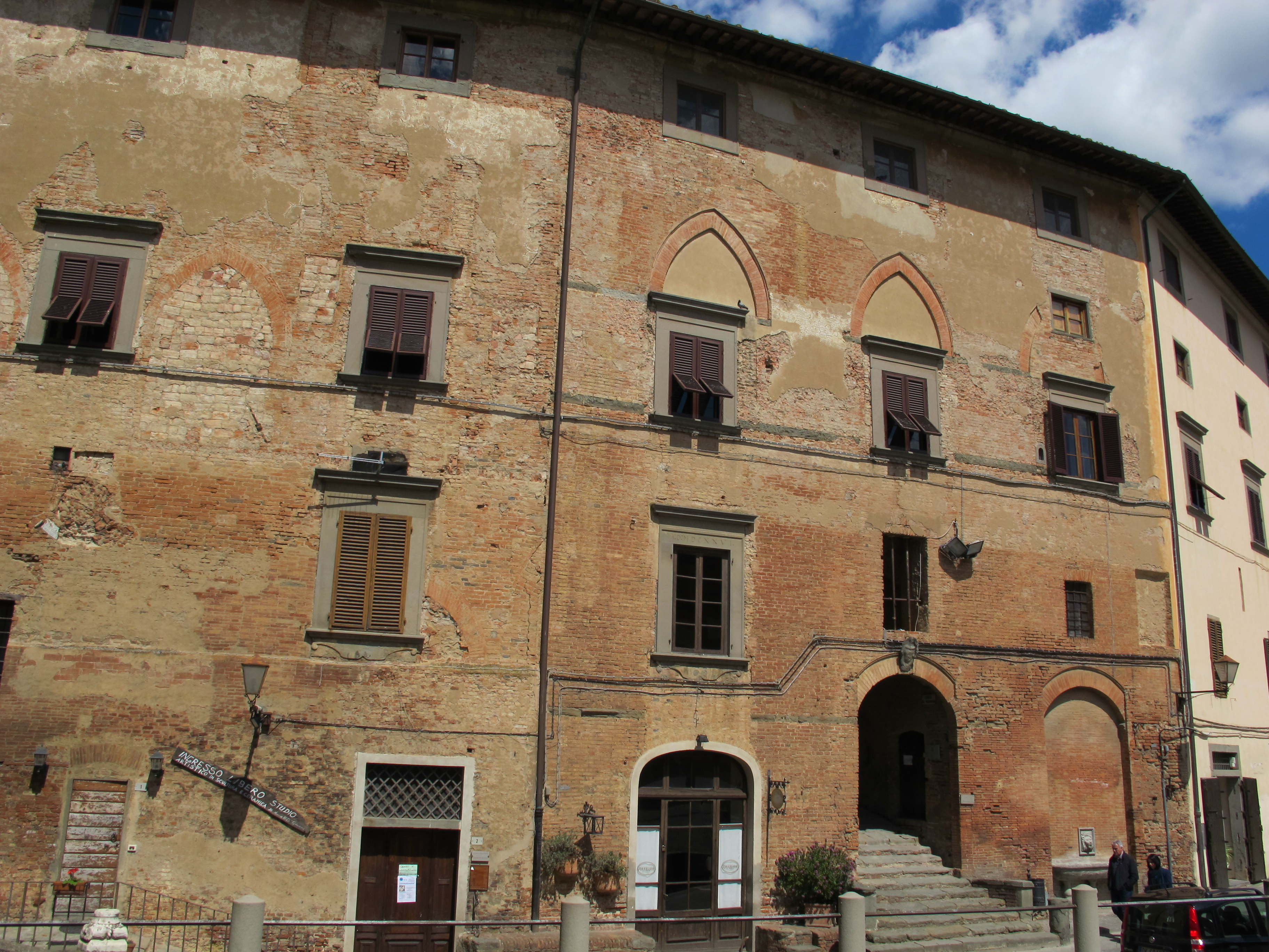 San miniato, palazzo vescovile, retro